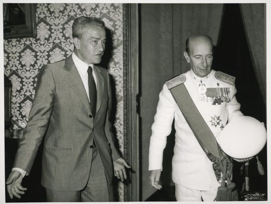 Il presidente della Camera dei Deputati Pietro Ingrao riceve l'ammiraglio Gino De Giorgi